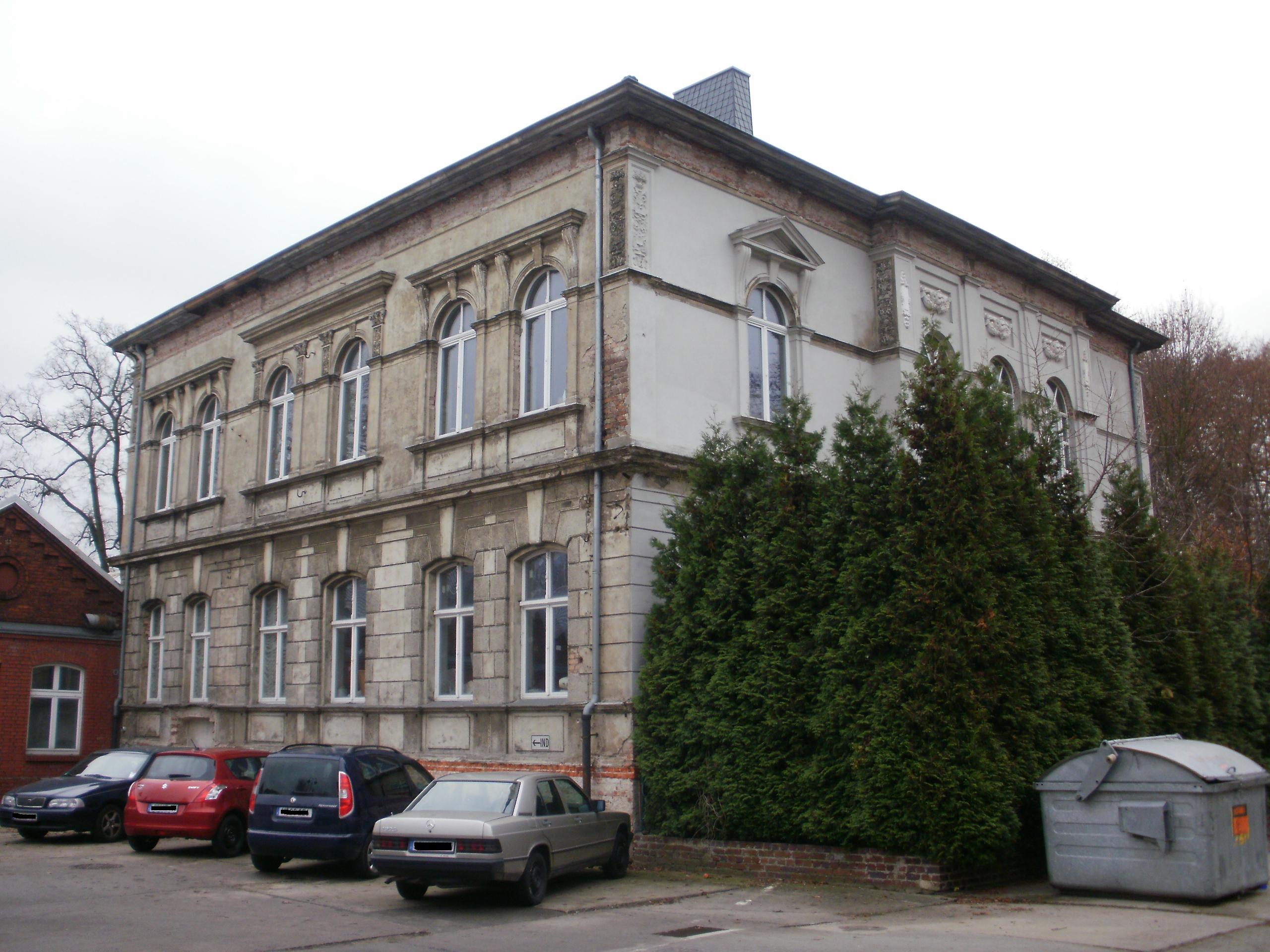 Fabrikantenvilla Ostrower Damm 3, Cottbus